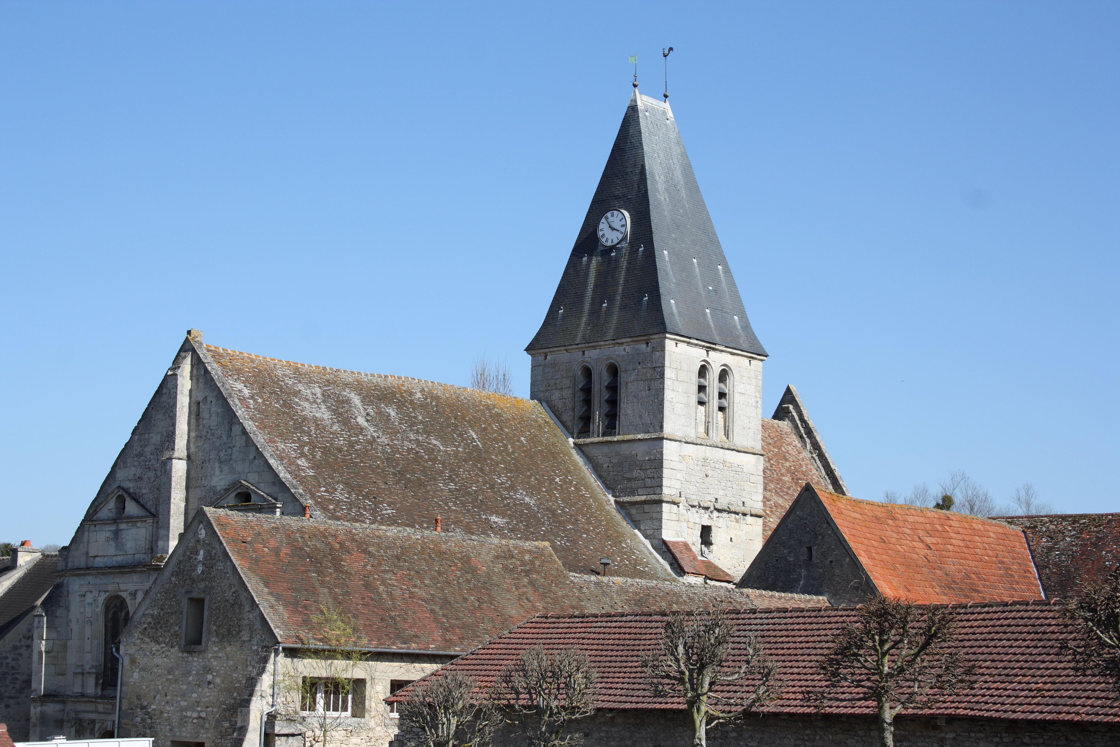 Kirche Saint-Pierre in Genainville